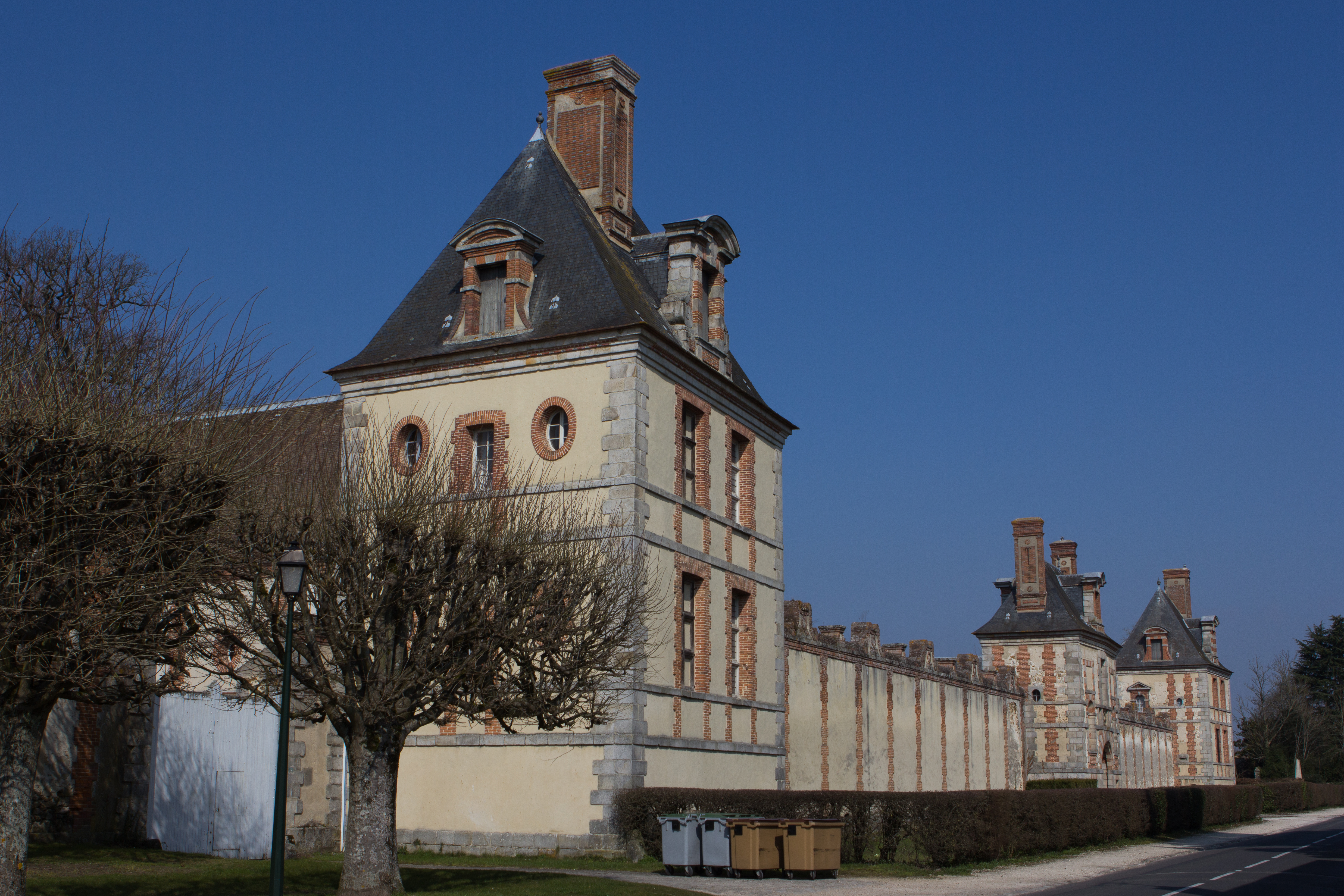 Château de Fleury-en-Bière ( Fleury-en-Bière, Seine-et-Marne, France)